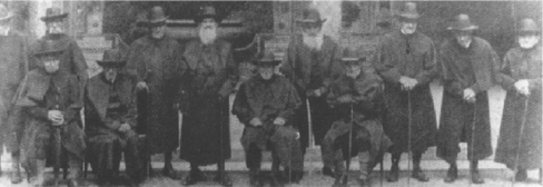 Die ältesten Bayern, als Apostel zur Fußwaschung durch den Herrscher gekleidet